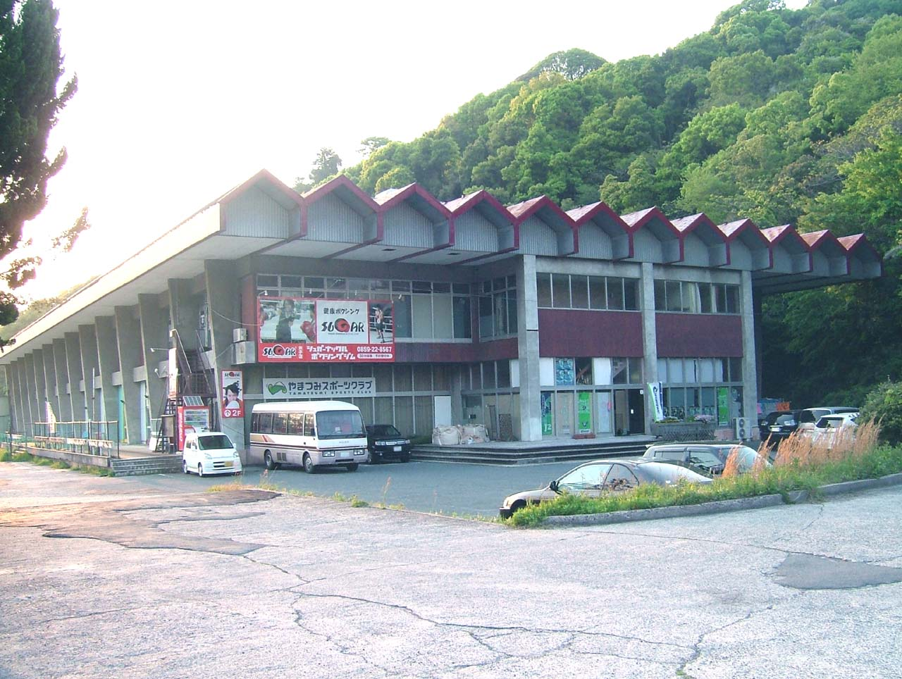 旧YSPスケートリンク